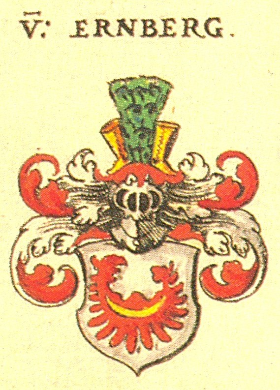 Ritterschaft und Adel in Franken von Ernberg